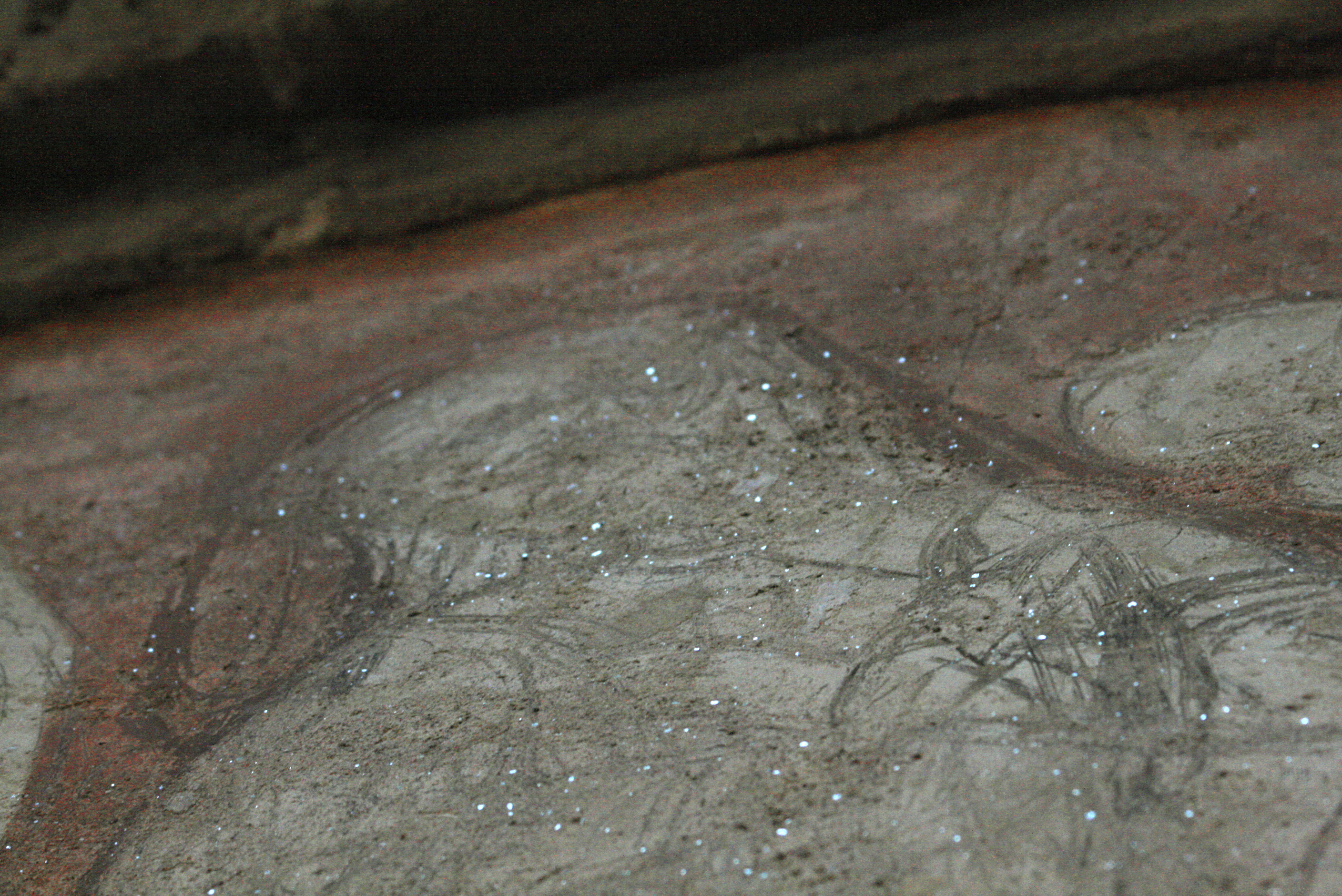 Détail montrant les facettes poncées du mica sur la surface de la fresque, indiquant son achèvement technique.